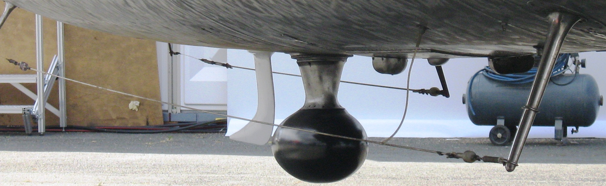 Antenne d'avion au Bourget au Salon international de l'aéronautique et de l'espace 2011